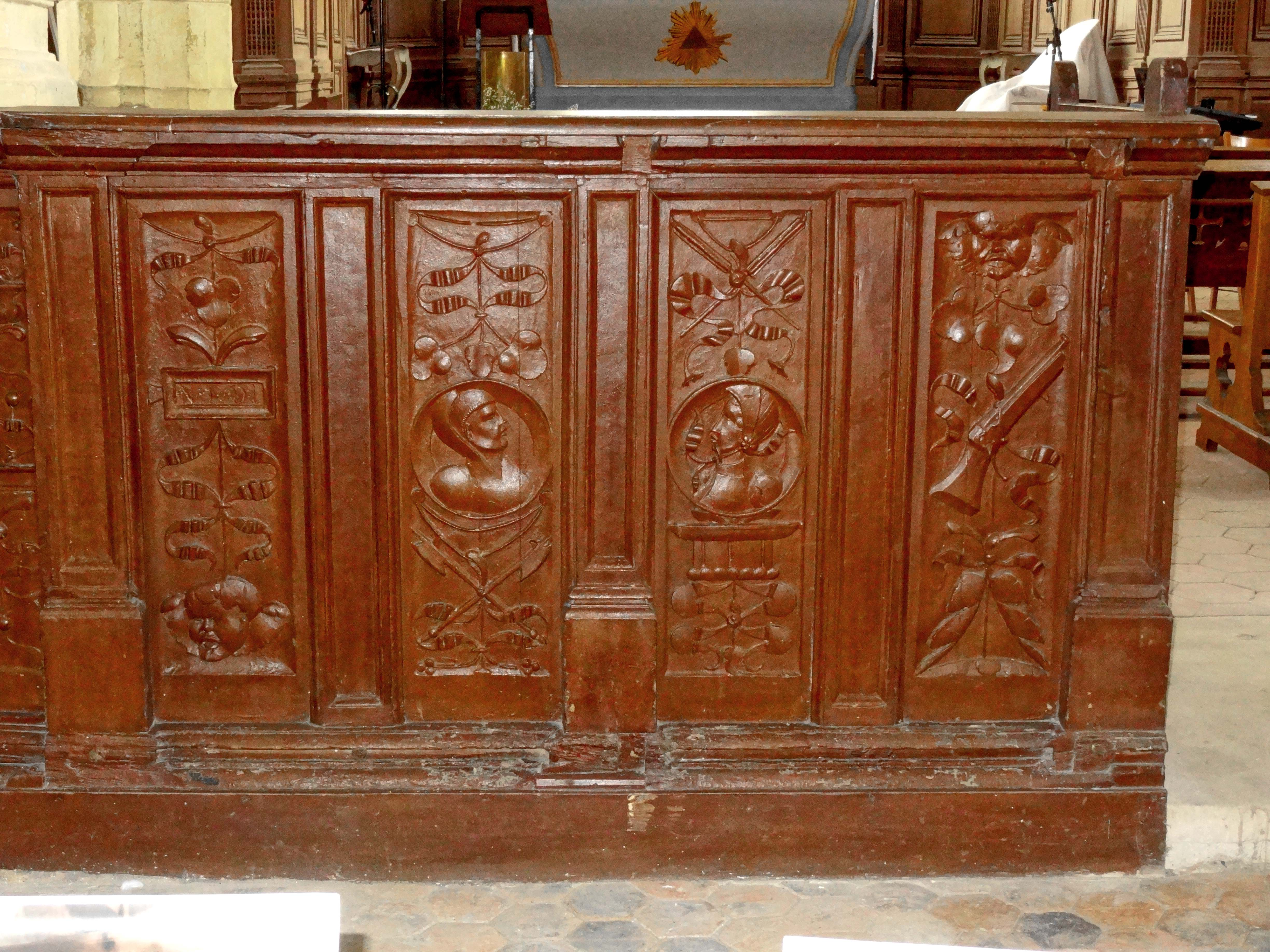 Mobilier de l'église - voir titre.